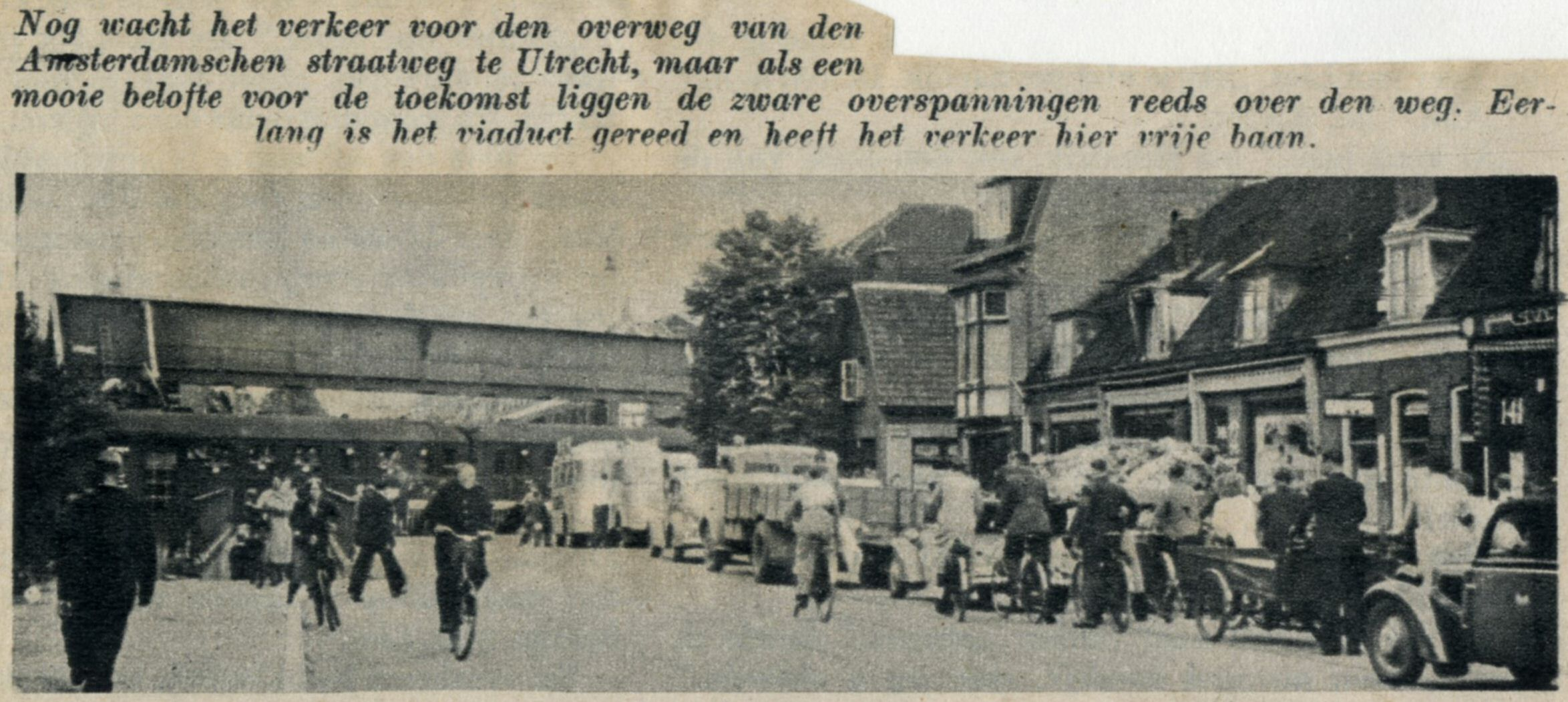 Afbeelding van een file voor de spoorwegovergang in de Amsterdamsestraatweg te Utrecht, met op de achtergrond het nieuwe, nog niet in gebruik gestelde spoorviaduct, en aan de linkerzijde een voetgangerstunnel.